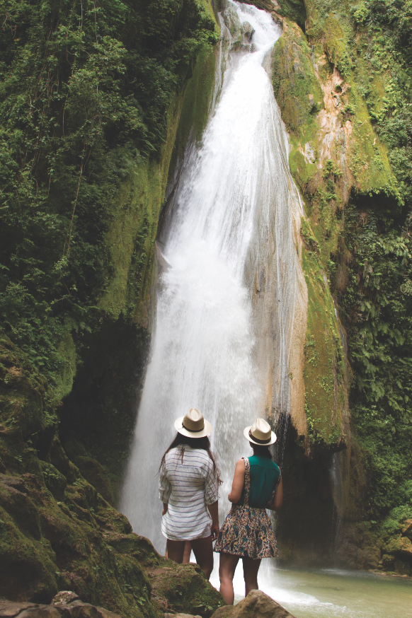 Actividades turísticas en la Sierra Gorda de Querétaro